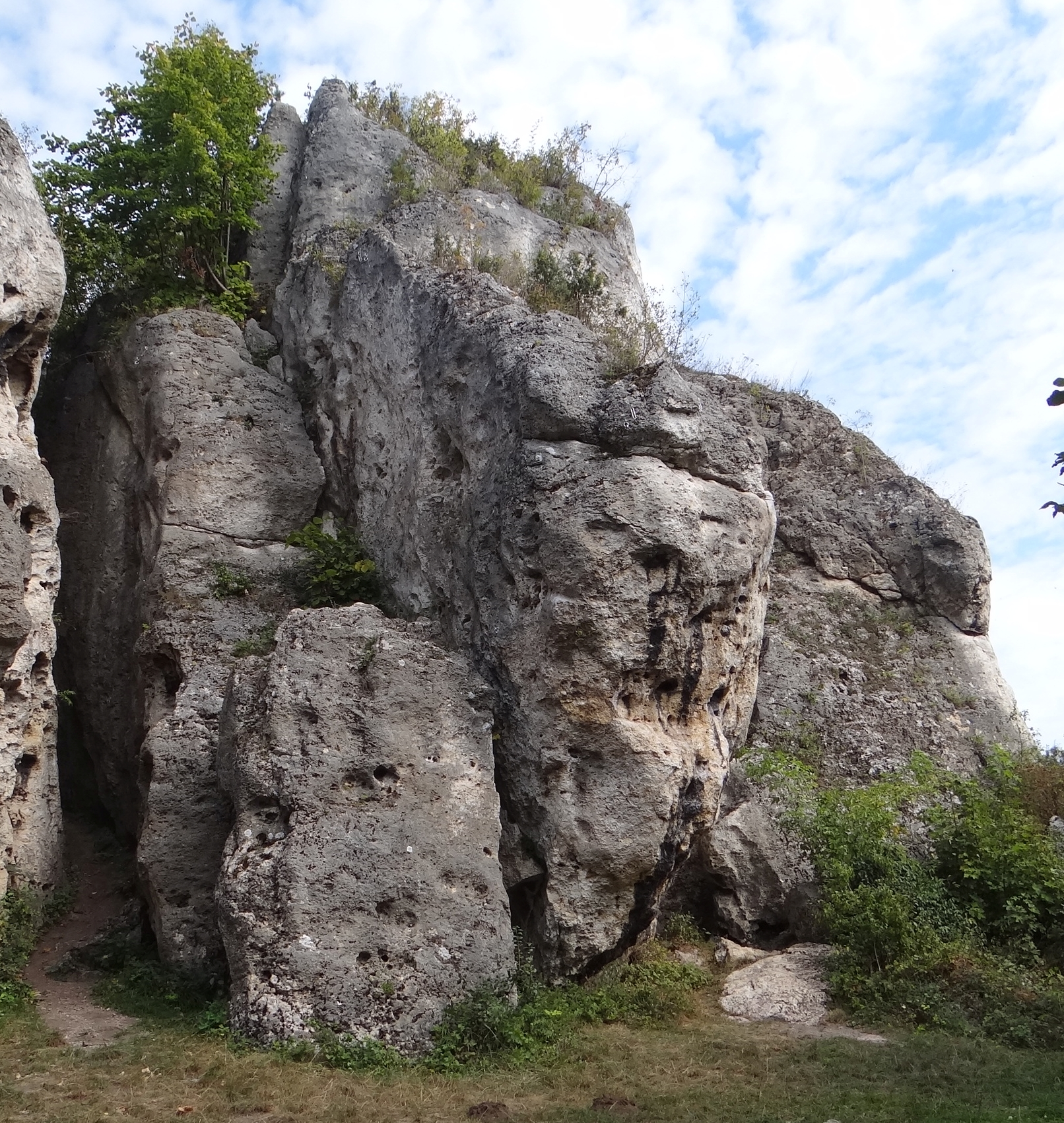 Skała Słoń w Łutowcu